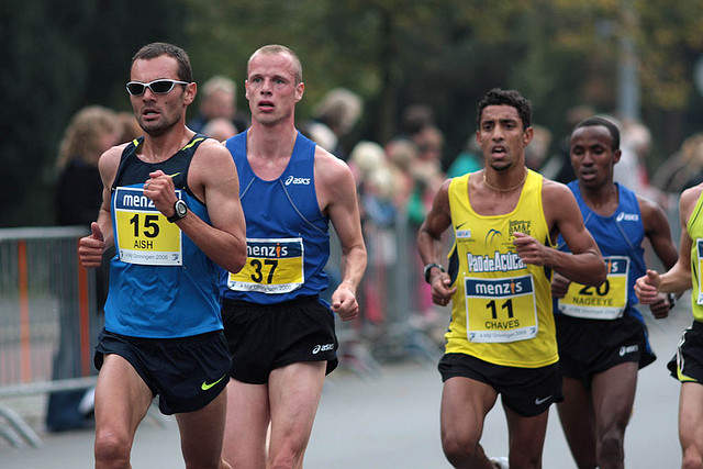 4 Mijl van Groningen